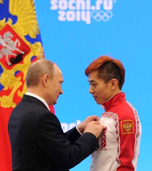 Орденом «За заслуги перед Отечеством» четвёртой степени награждён трёхкратный олимпийский чемпион и бронзовый призёр олимпийских игр в шорт-треке Виктор Ан.